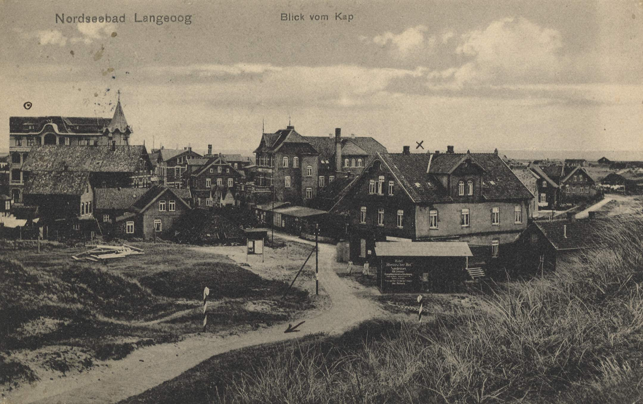 Nordseebad Langeoog. Blick vom Kap.